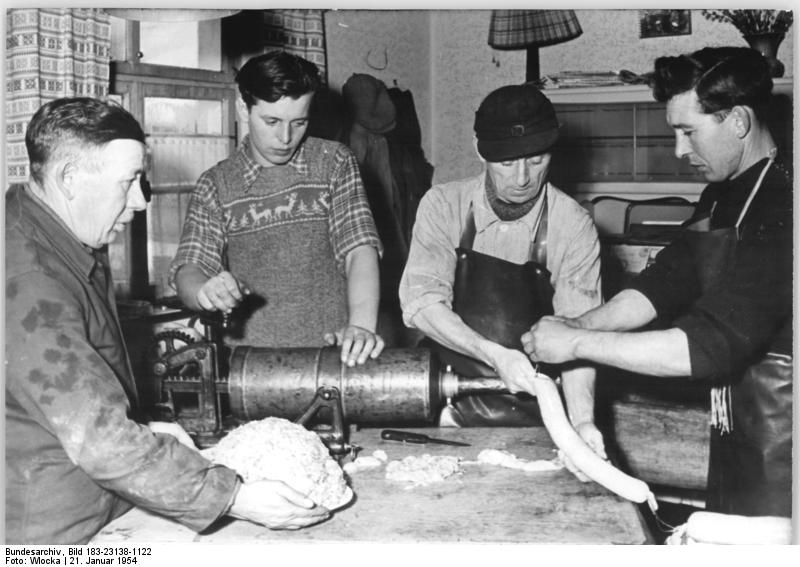 LPG Merxleben, Bauern beim Wursten Zentralbild TBD-(Wlocka)-Ri.21.1.1954 Aus der Arbeit der Landwirtschaftlichen Produktionsgenossenschaft "Walter Ulbricht" in Merxleben, Kreis Langensalza in den Wintermonaten. Reges Leben herrscht auch in den Wintermonaten bei den Genossenschaftsbauern von Merxleben. Es wird gebaut, die landwirtschaftlichen Maschinen und Geräte instandgesetzt, regelmäßig wird die bäuerliche Winterschulung von der Kreisvolkshochschule Langensalza durchgeführt und im Parteilehrjahr wird intensiver gelernt als in den Sommermonaten. Viele Sitzungen und Diskussionen erfordern die neuen Anbaupläne für 1954 und der Abschluss der Verträge zwischen der LPG und ihrer MTS. UBz: Beim Genossenschaftsbauern Hermann Walter (1.v.l.) ist Schlachtfest. Genossenschaftsfleischer Kurt Lier (2.v.r.) hilft den Bauern beim stopfen der Knackwürste. Kurt Lier macht sich auch bei anderen Gelegenheiten sehr nützlich. Wenn Deligatione Merxleben besuchen, ist er als Koch tätig, und auch im Kinderferienlager der LPG sorgte er für das leibliche Wohl der kleinen Urlauber. (1.v.r.) Der Sohn vom Genossenschaftsbauern Walter.